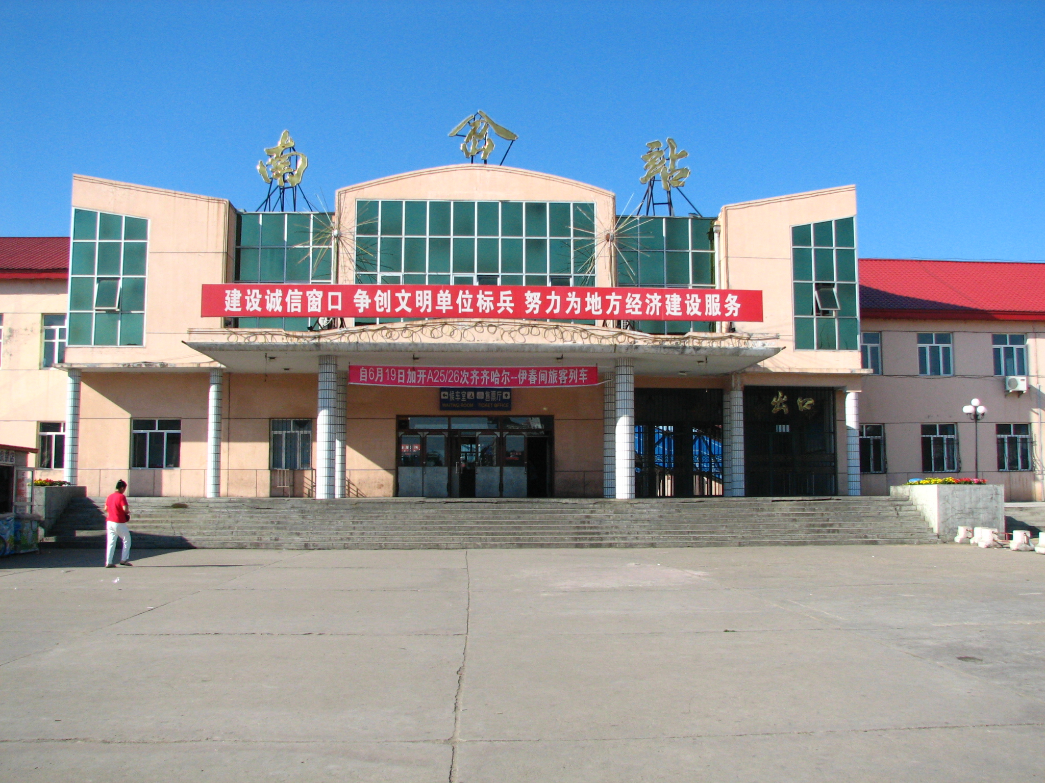 黑龙江省南岔站